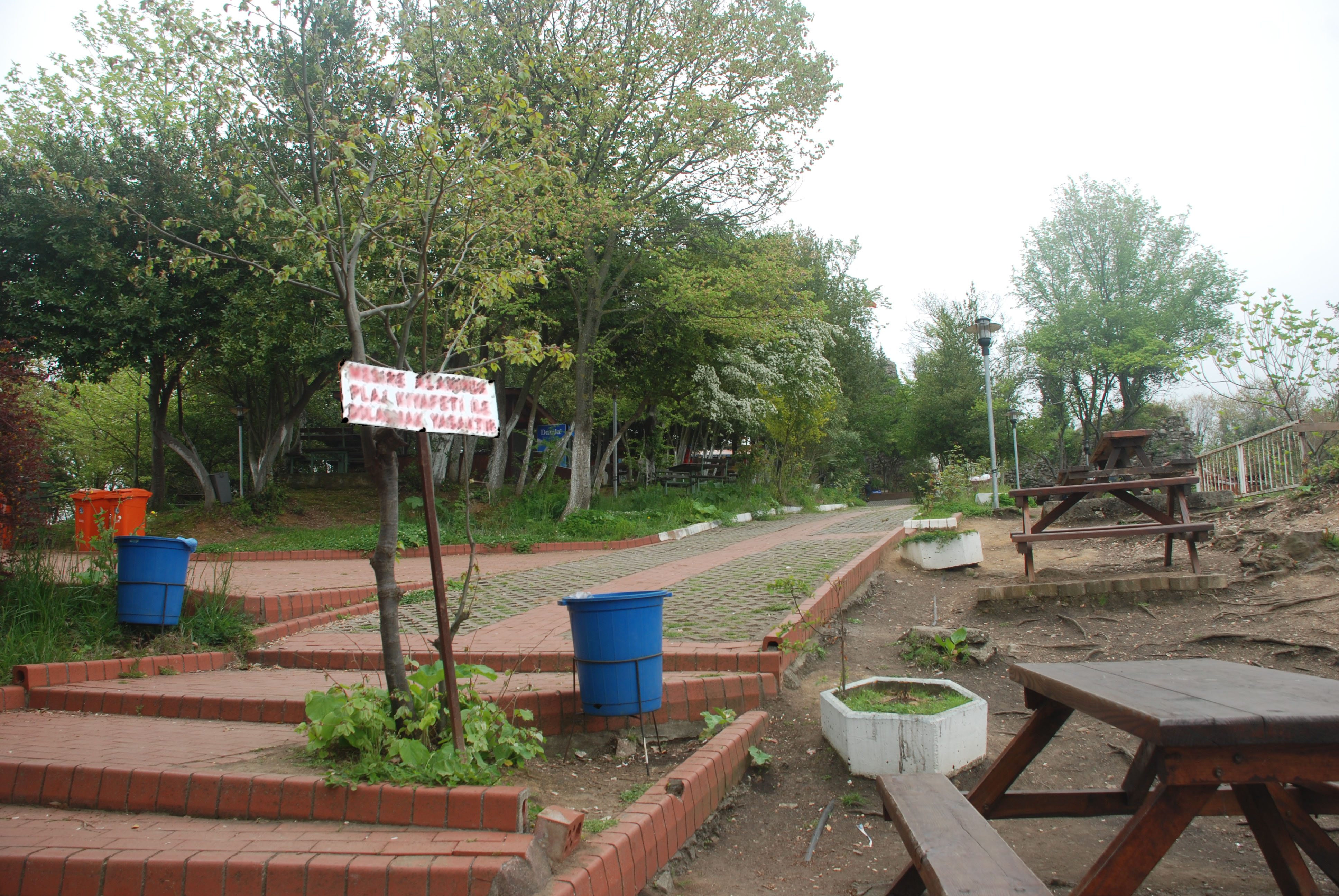 Akçakoca Ceneviz Kalesi mesire yeri.